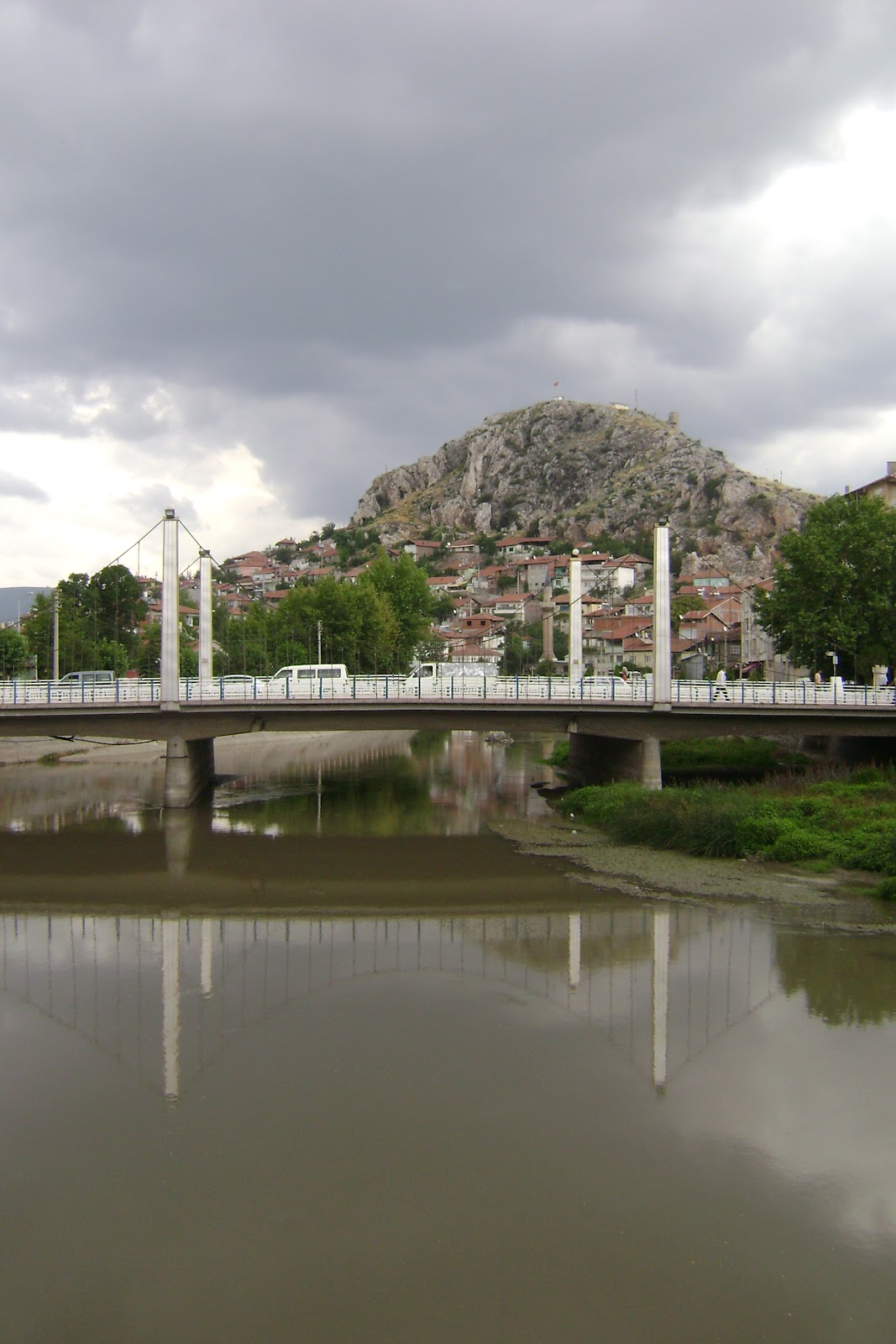 Tokat iline bağlı Turhal ilçe merkezinde bir köprü